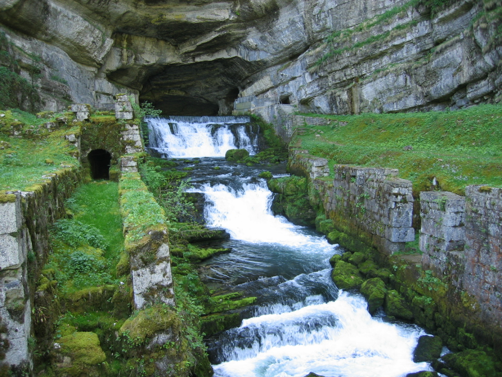 Source de la Loue dans le Doubs ( résurgence du Doubs )